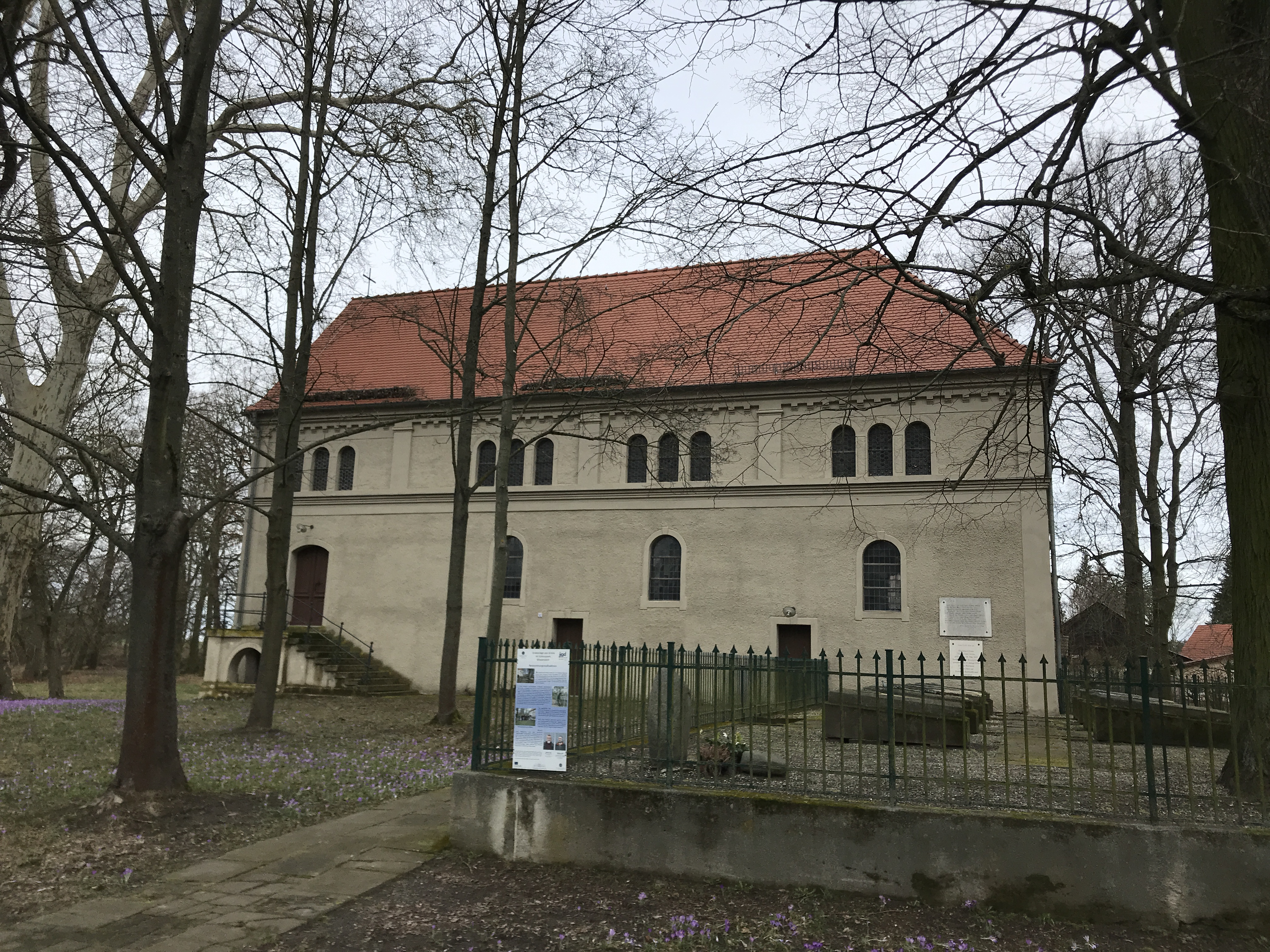 Die Dorfkirche Wiepersdorf geht in ihrem Kern auf einen mittelalterlichen Feldsteinbau zurück und ist Bestandteil des Schlosses Wiepersdorf